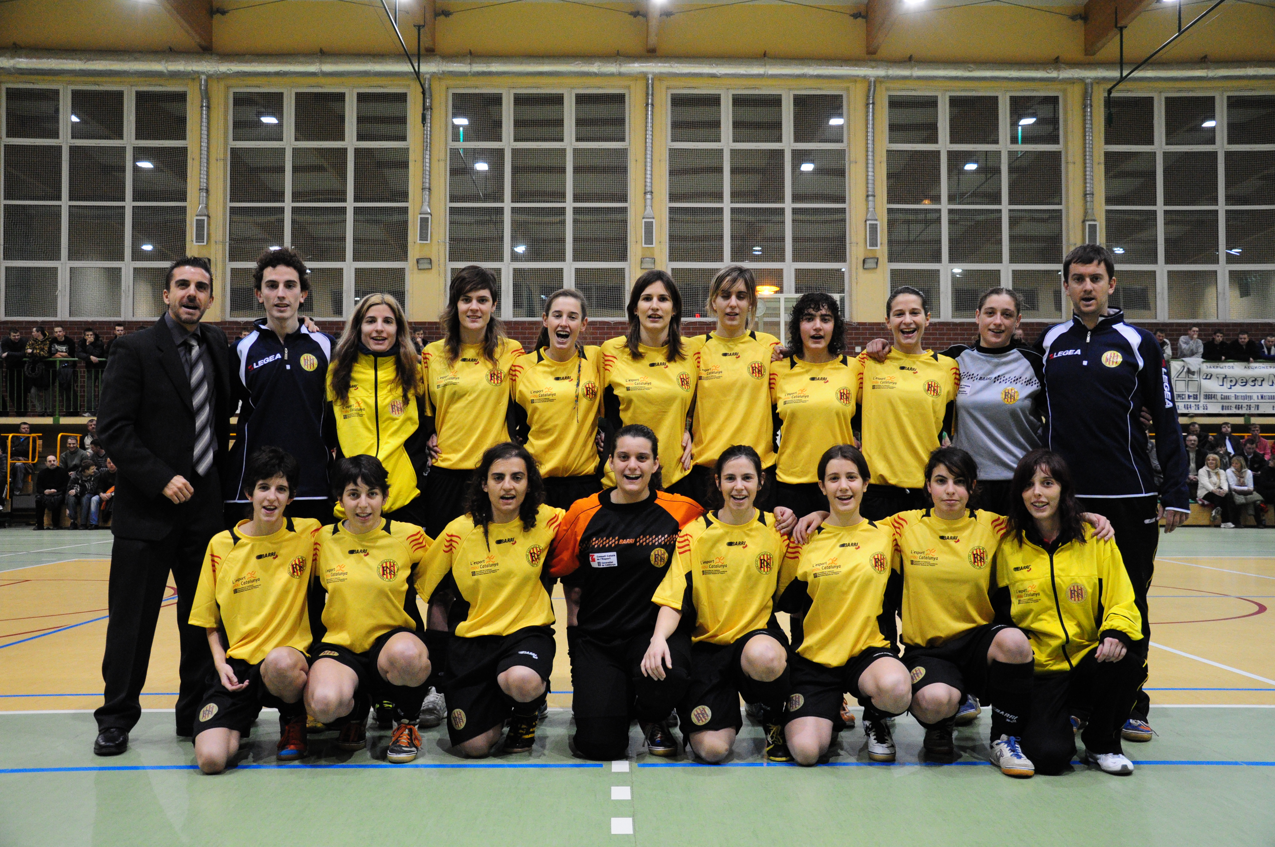 Catalunya Absoluta Femenina Futsal (Paczkôw 2009)